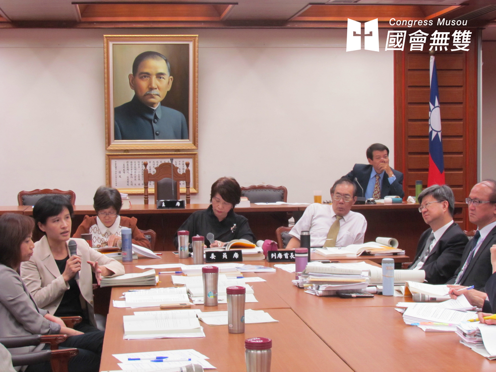 立法院教育文化委員會今（29）日審查教育部主管預算